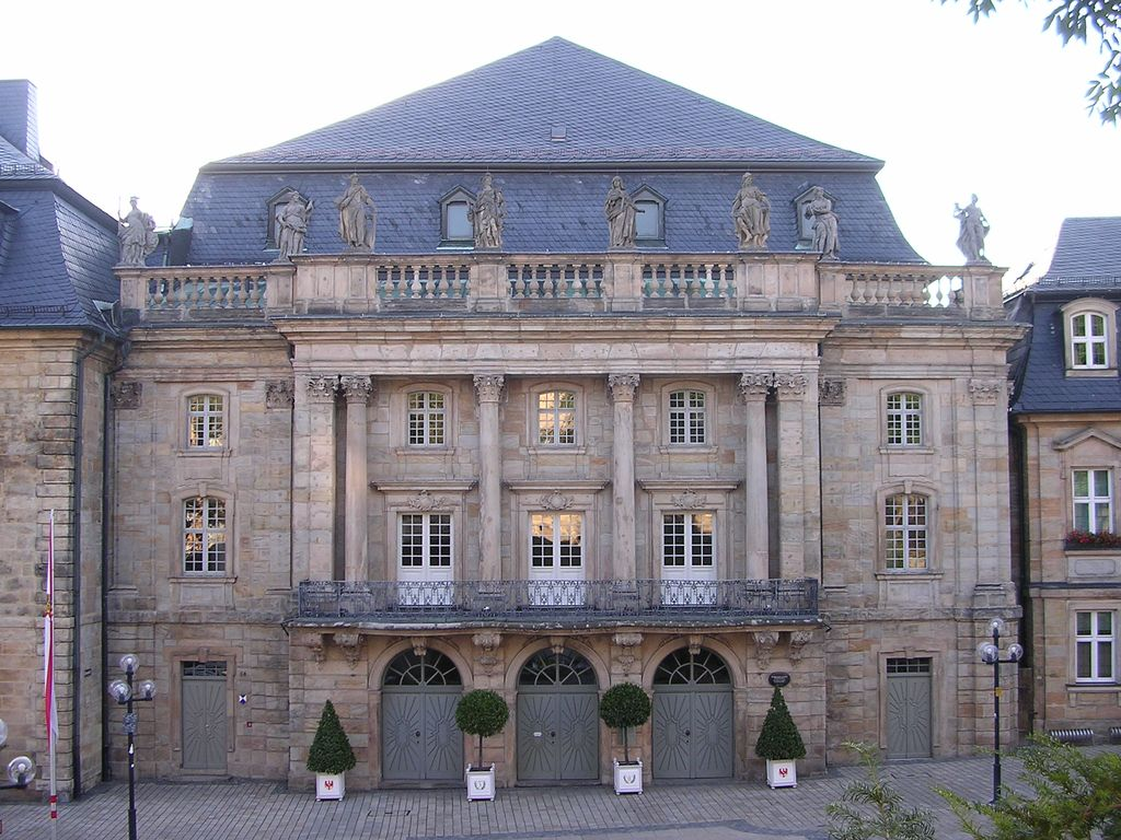 Markgräfliches Opernhaus in Bayreuth